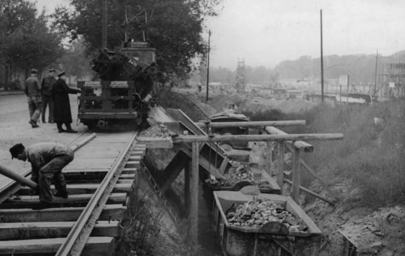 Frankfurt/Main, Trümmerverwertung Trümmerverwertung in Frankfurt/Main Bild zeigt: Die Trümmer werden mittels Gleisanlage zur Verarbeitung in die Ostparkanlage gebracht. Foto: EDU-Illus 993-47